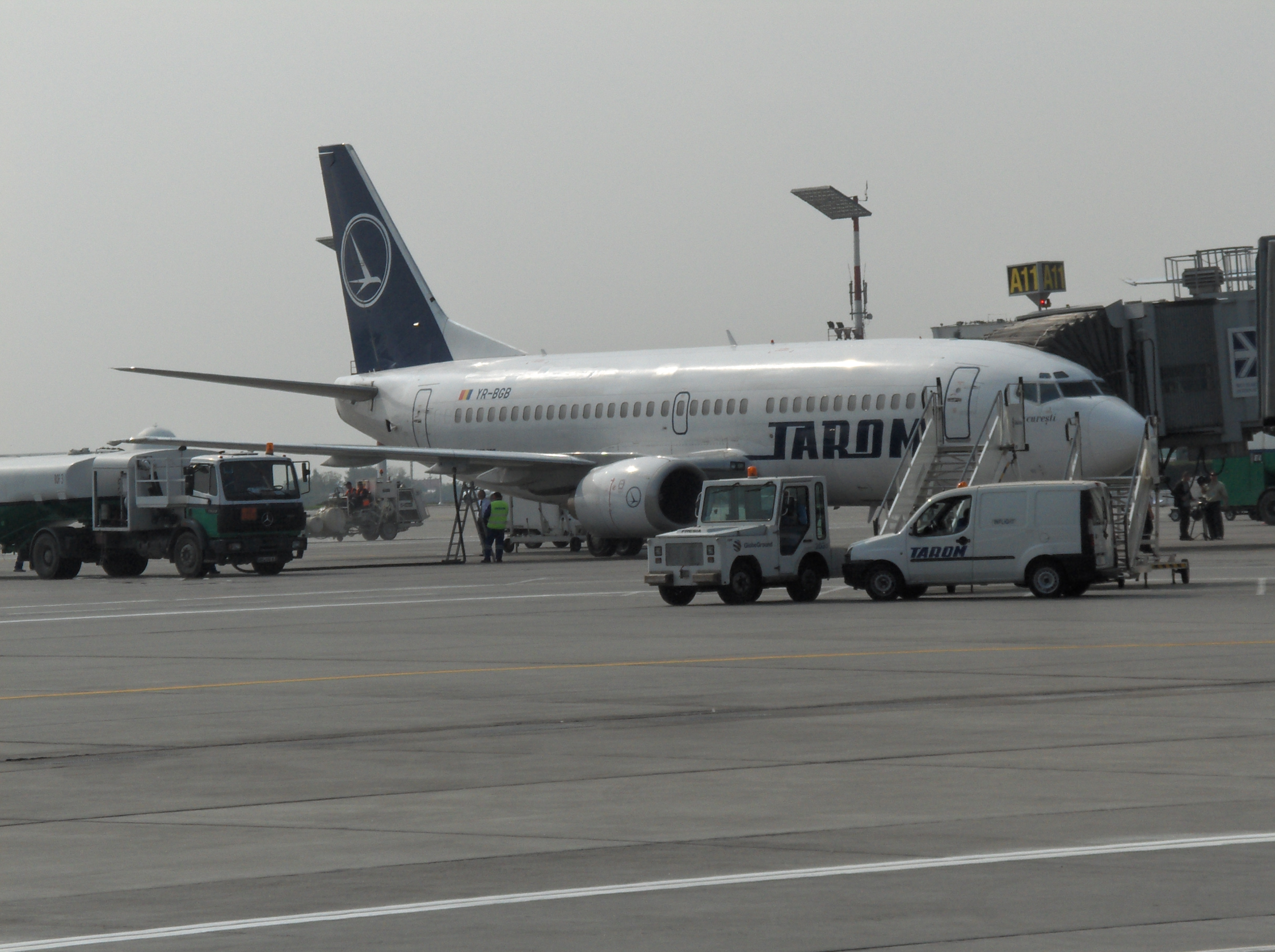 YR-BGB "Bucuresti" at OTP Airport, Bucharest, Romania